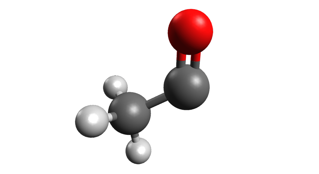 Struttura 3D a sfere-bastoncelli del gruppo acetile